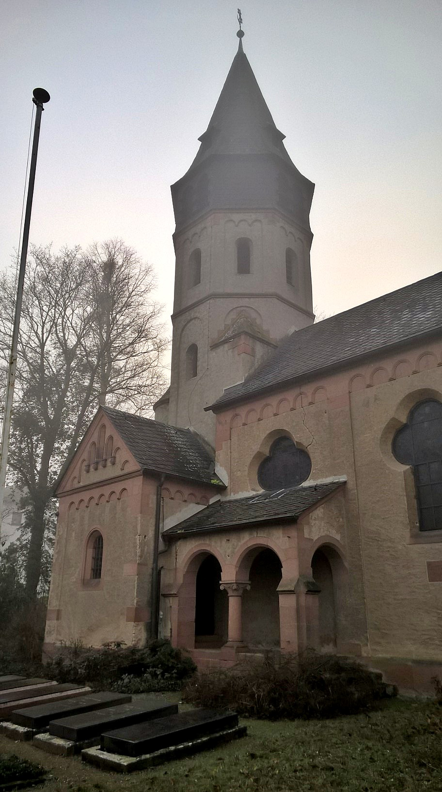 Gottliebenkapelle in Worms Herrnsheim: Ansicht vom Park. Vierseitiger romanisierender Komplex mit Kirche und Kreuzgang, erbaut vom Architekten Gabriel von Seidl, München als neuromanischer Werksteinbau auf kreuzförmigem Grundriss. Ausstattung mit eingeschossigem Kreuzgang mit Grabkammern. Allee Etwas oberhalb auf der Herrnsheimer Höhe befindliche Grabkapelle der Freiherren von Heyl zu Herrnsheim, mit einem Kreuzgang. Sie wurde im Jahre 1891 erbaut und befindet sich im Familienbesitz. Die Nutzung als Grabstätte begann 1915 mit dem Tod der Ehefrau Sophie Freifrau von Heyl zu Herrnsheim geborene Stein, (1847 Köln - 1915 Bad Ems). Erbauer und Ehemann Cornelius Wilhelm von Heyl zu Herrnsheim (1843–1923) wurde acht Jahre später 1923 neben ihr bestattet. Der Industrielle Cornelius Heyl hatte 1883 Schloss Herrnsheim nebst Park von John Dalberg Acton gekauft.